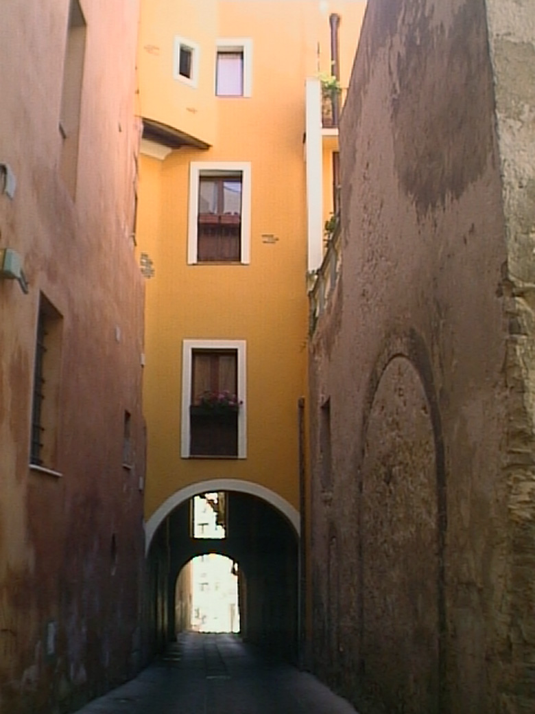 Portico in via del Fossario, Cagliari, quartiere Castello